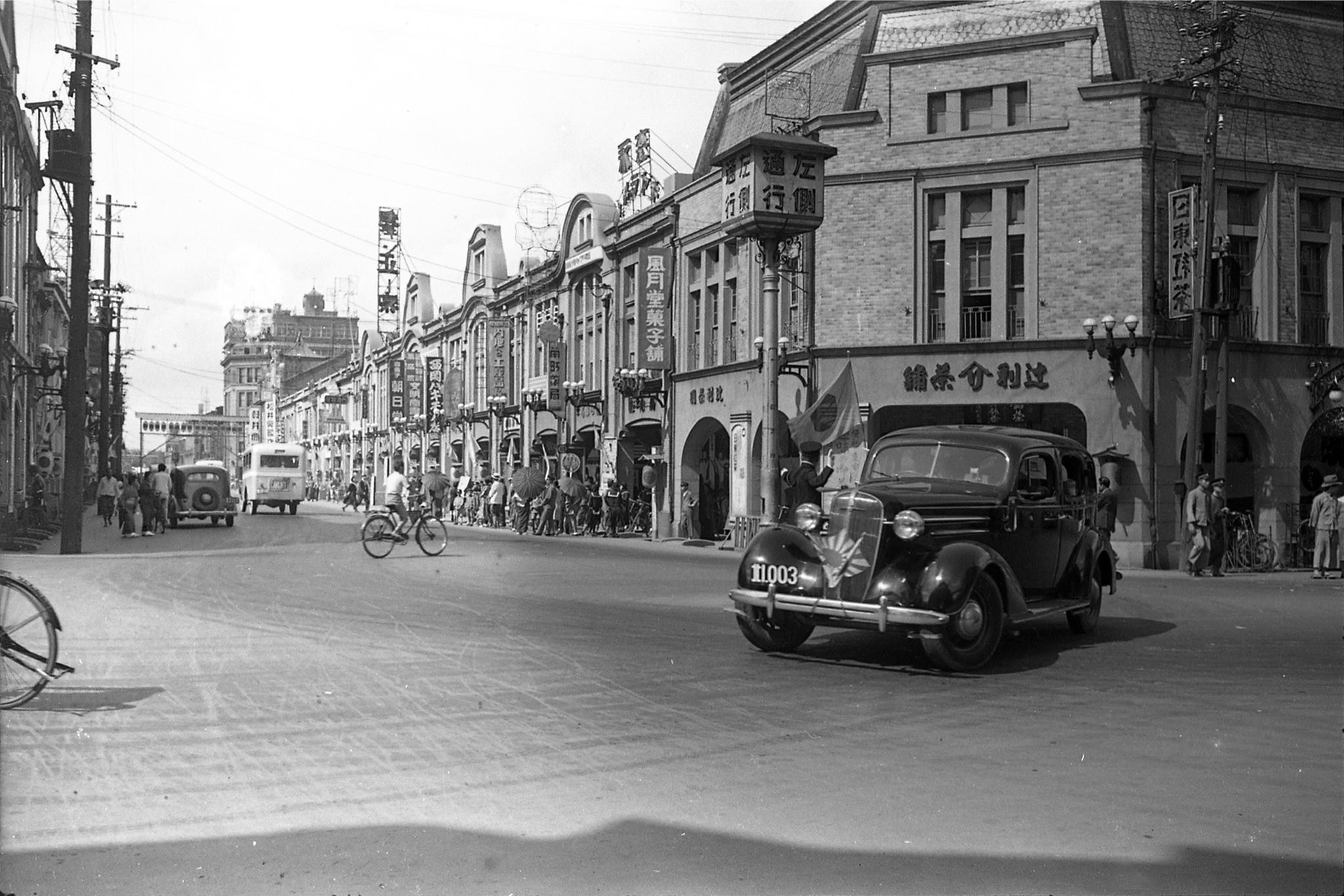 臺北市榮町街景。